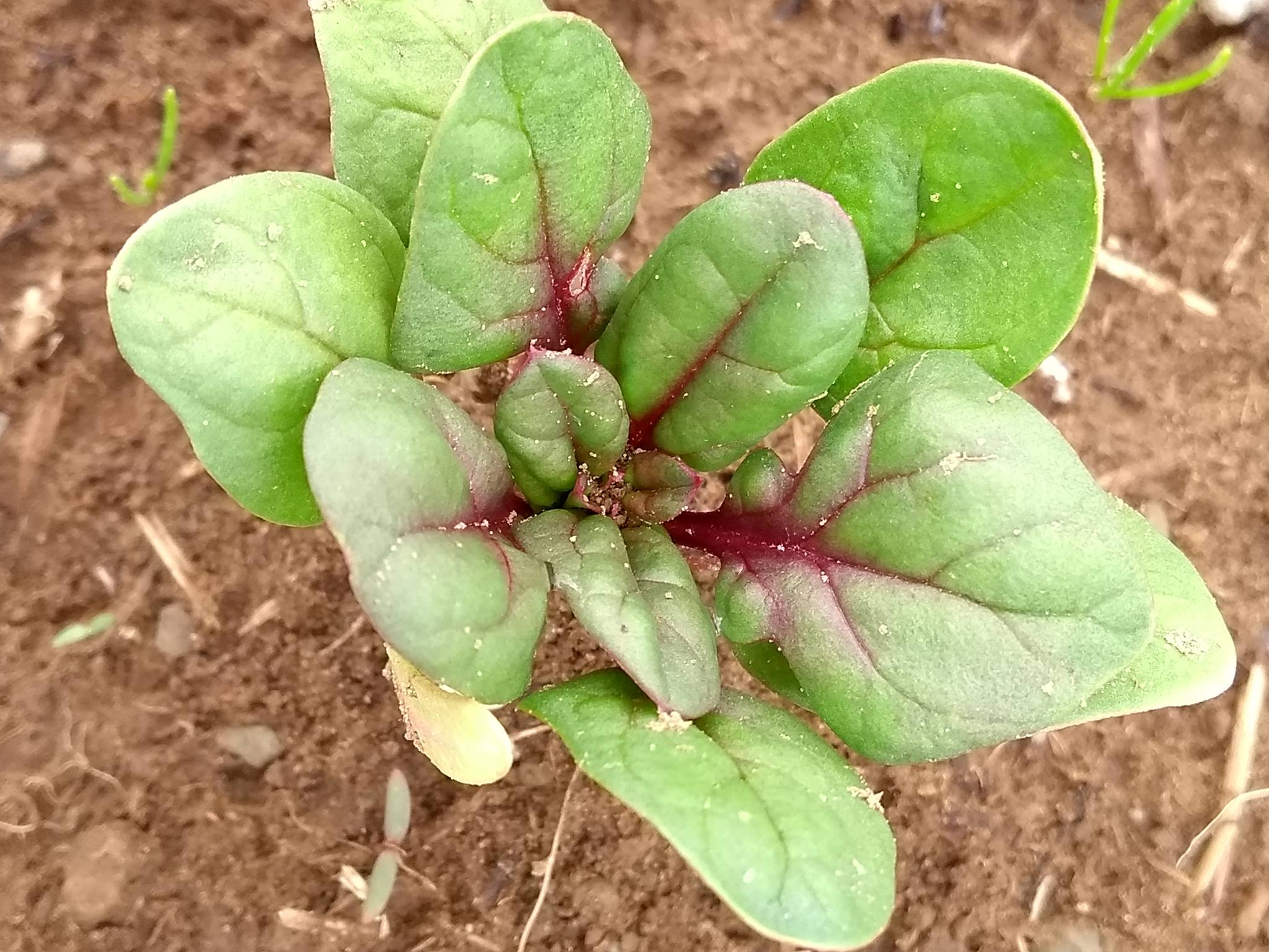 Épinard veiné rouge